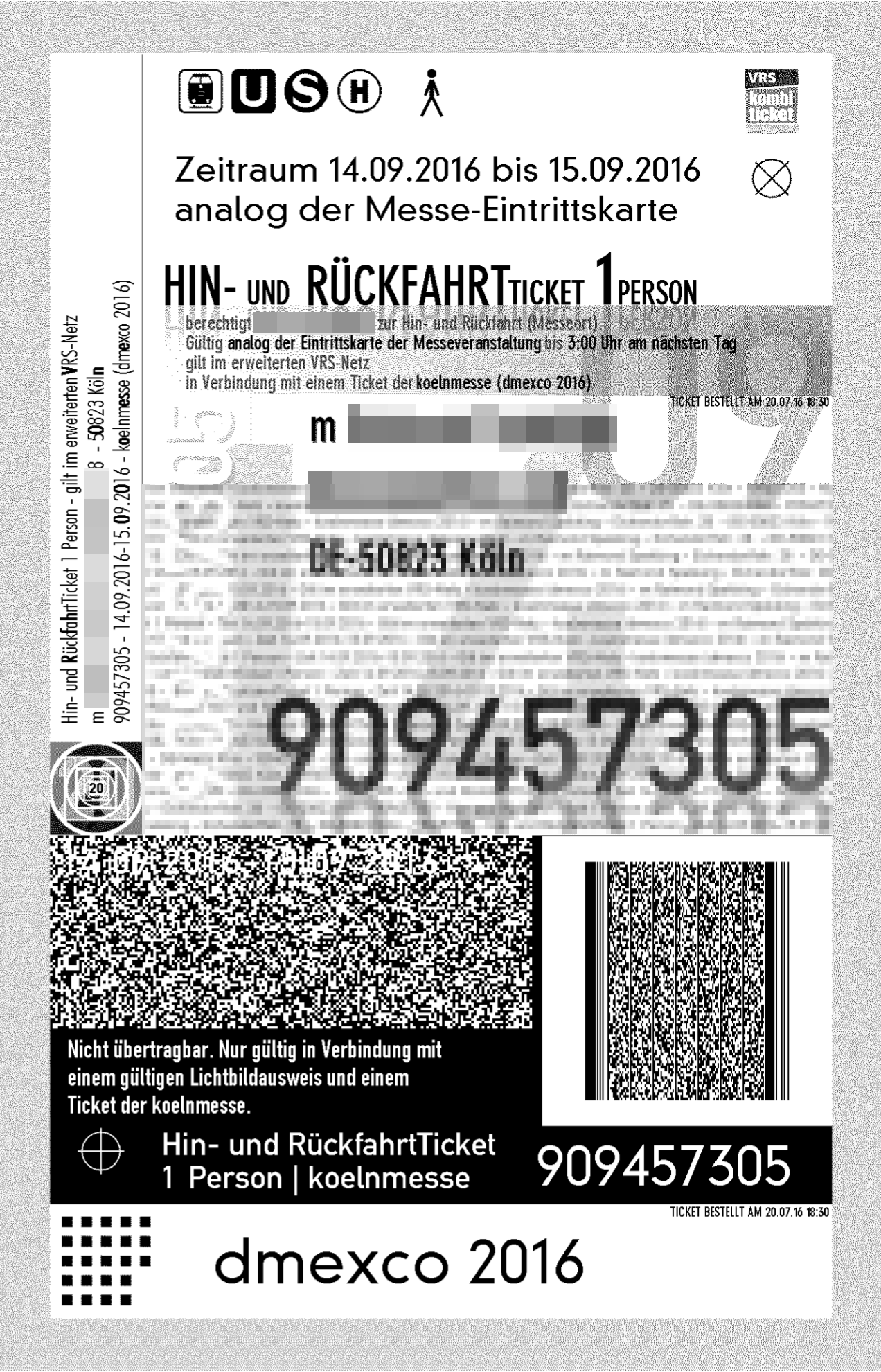 Kombiticket für die Fahrt im VRS zur dmexco auf dem Gelände der Koelnmesse